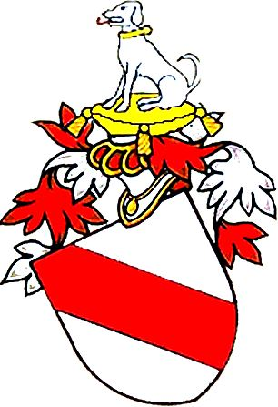 Společný erb Těmínů z Těmic, Vítů ze Rzavého, Lapáčků z Vrážného, Sádlů z Vrážného a Chrtů z Ertína